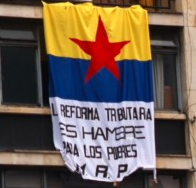 Bandera M.R.P. en edificio de la DIAN calle 34